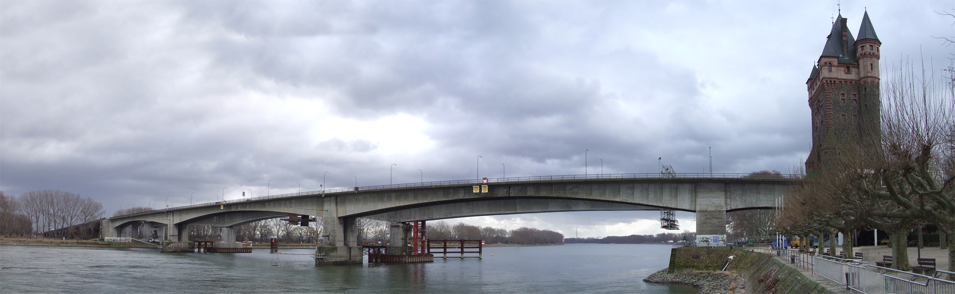 Panoramaaufnahme. Blick vom Rheinufer in der Nähe des Hagendenkmals auf die Nibelungenbrücke (Worms). Hinweis: Das Bild wurde aus mehreren einzelbildern zusammengesetzt. Der Wolkenhimmel im linken oberen Bereich musste ich "kopieren".